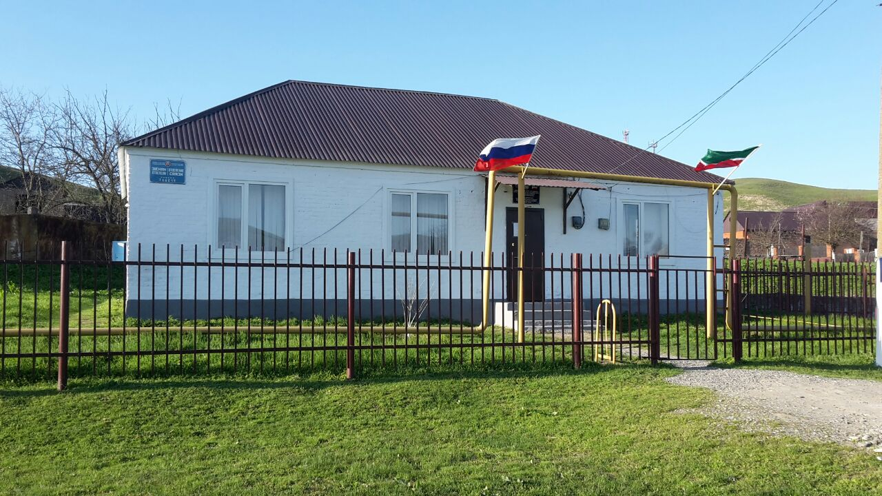 Нохчийн: Аьчка-ХитIан администраци